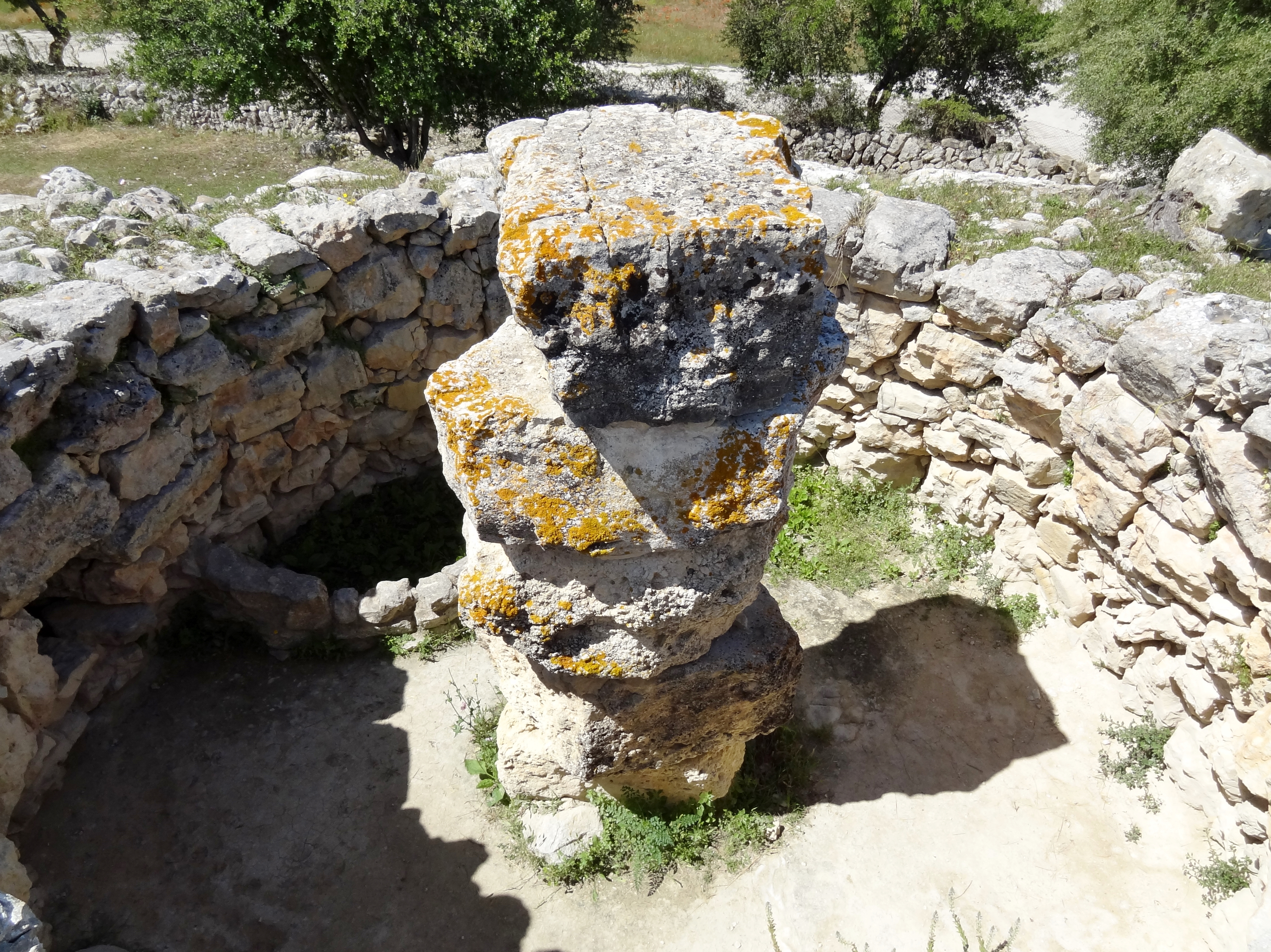 Talaiot 1 der Ausgrabungsstätte von Son Fornés, Gemeinde Montuïri, Mallorca, Spanien